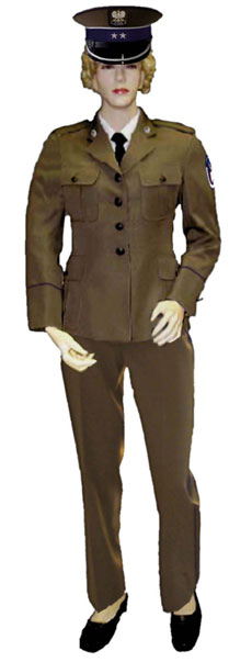 Umundurowanie wyjściowe ABW funkcjonariusza kobiety ze spodniami